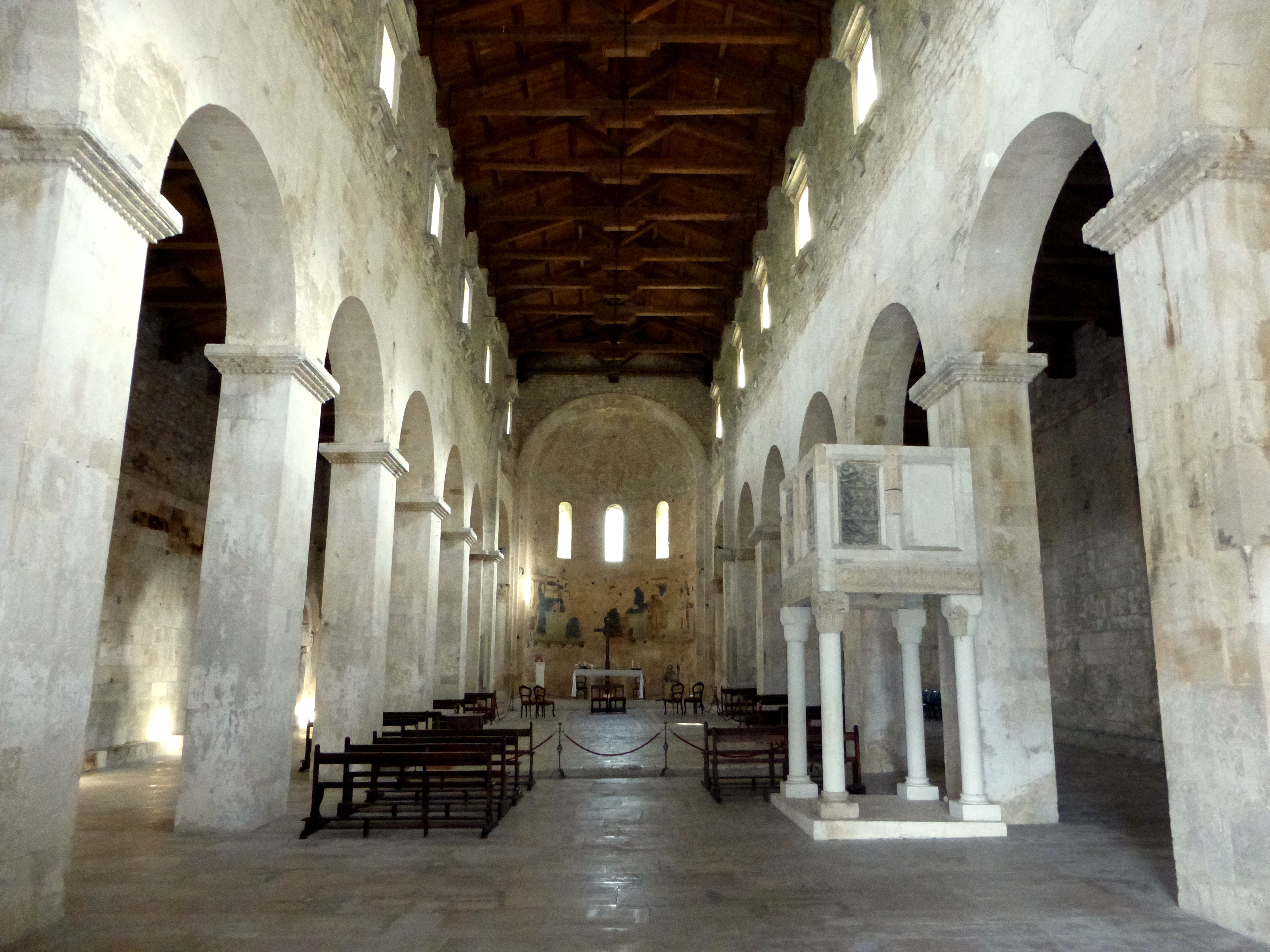 San Liberatore a Majella, Serramonacesca, Pescara.